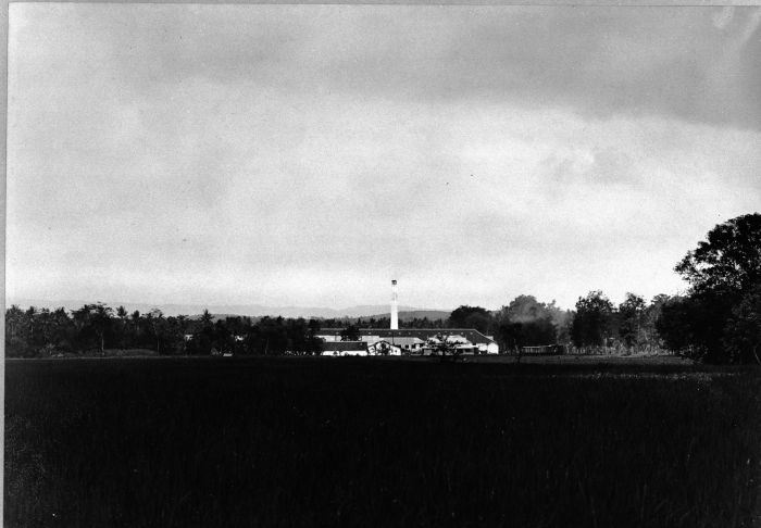 Foto. Gezicht op de suikerfabriek Kalibagor vanuit het spoorwegstation Soekaradja.